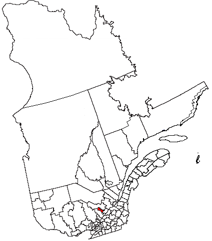 Volapük: Topam in provin: Québec.